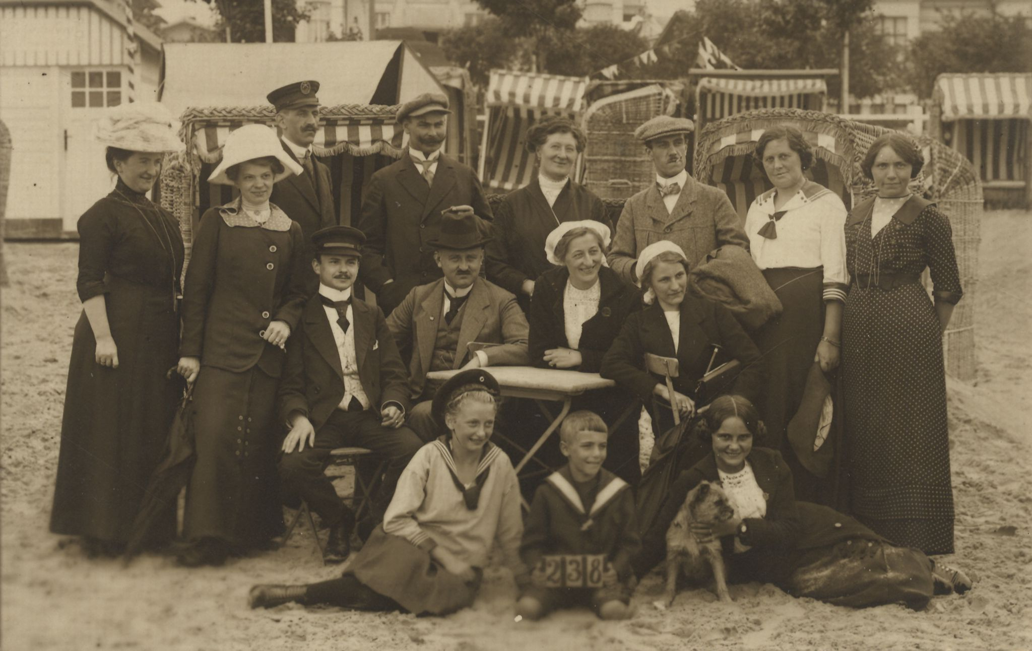 Vor den Strandkörben